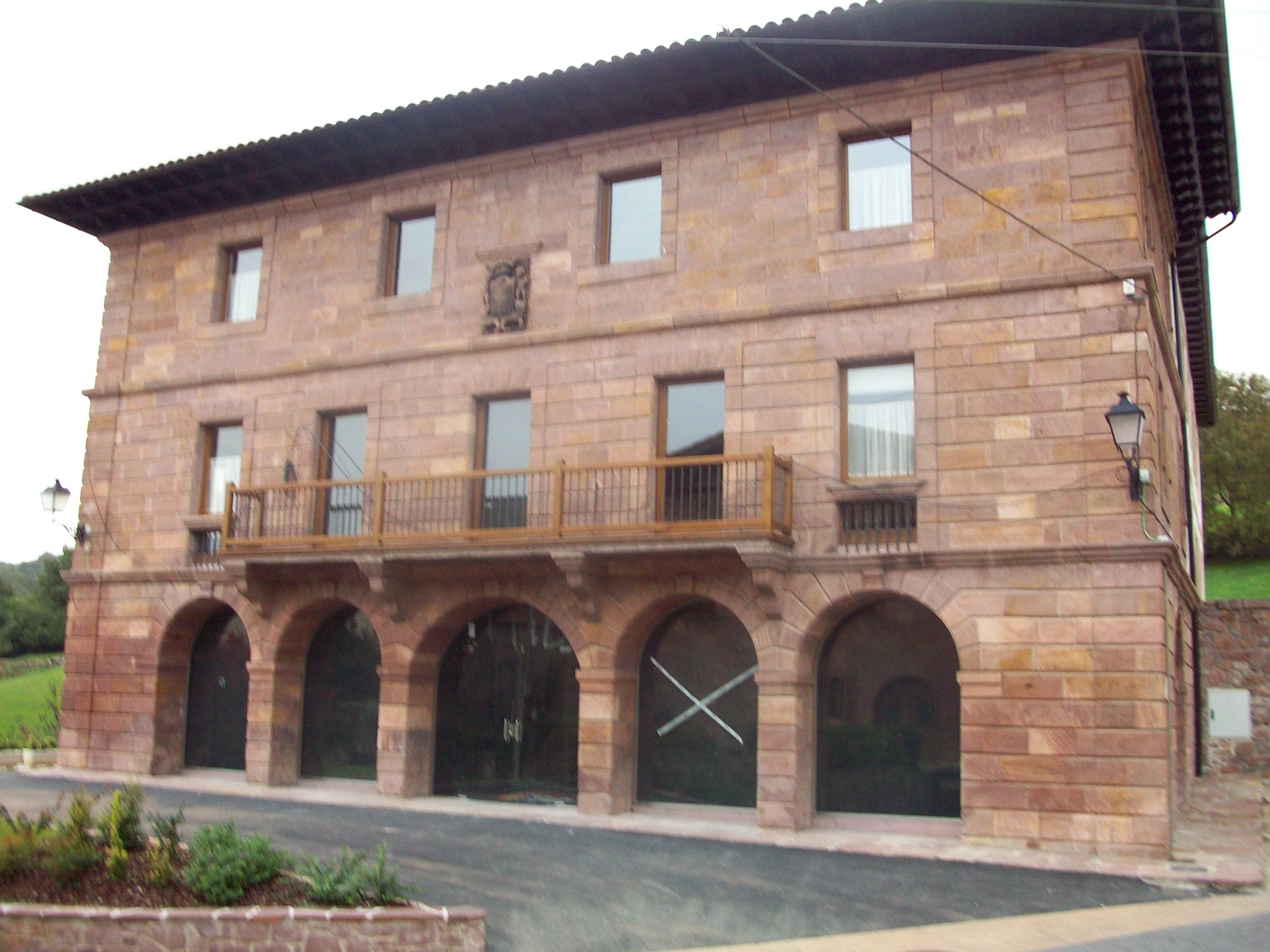 Baztango Amaiur udalerriko Borda jauregia. Nafarroa, Euskal Herria.